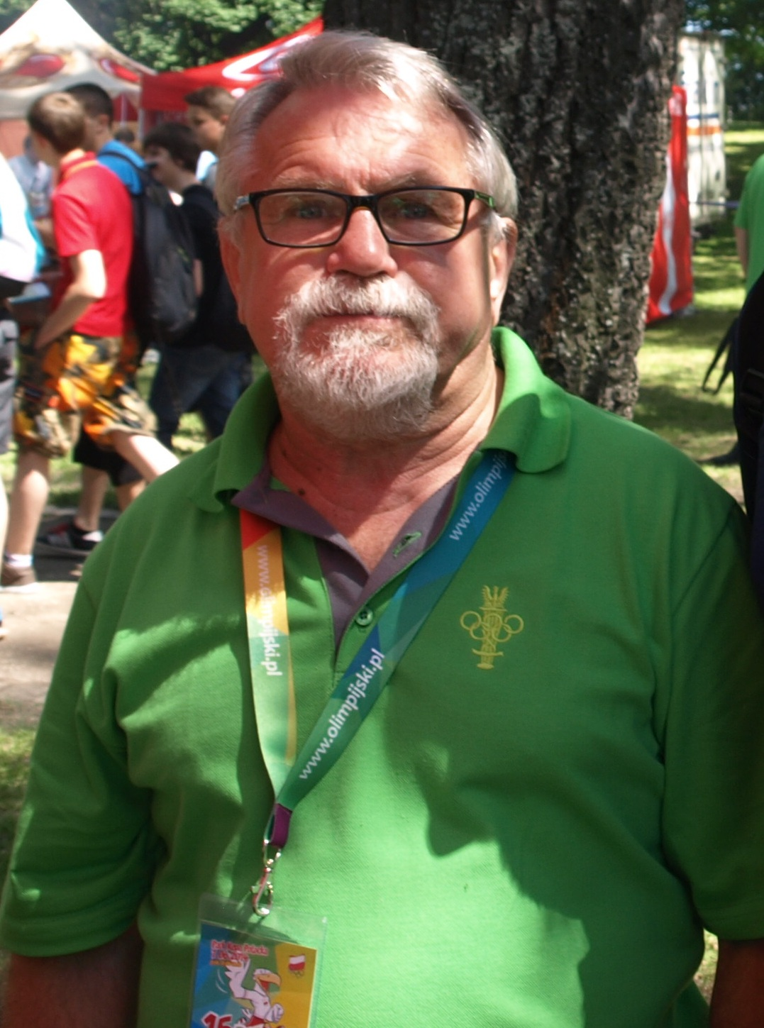 Hubert Skrzypczak, pięściarz.